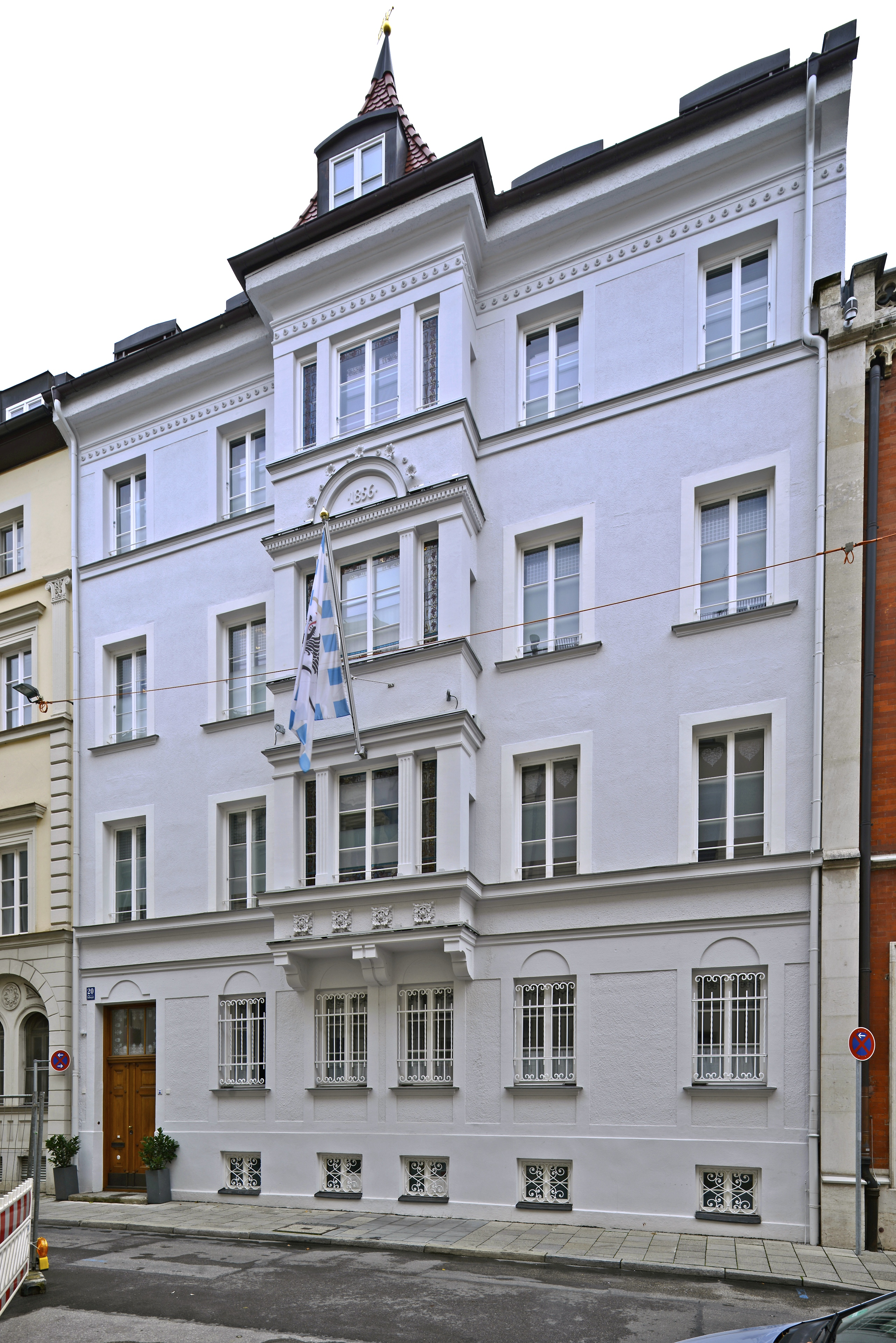 München, Fassadenansicht Stollbergstraße 20 im Zustand nach den Umbauarbeiten ab dem Jahr 2015. Rückbau der Fassade. Farbgebung der Fassade. Einbau eines Aufzugs. Instandsetzung des Gartens und des Gartenhauses.